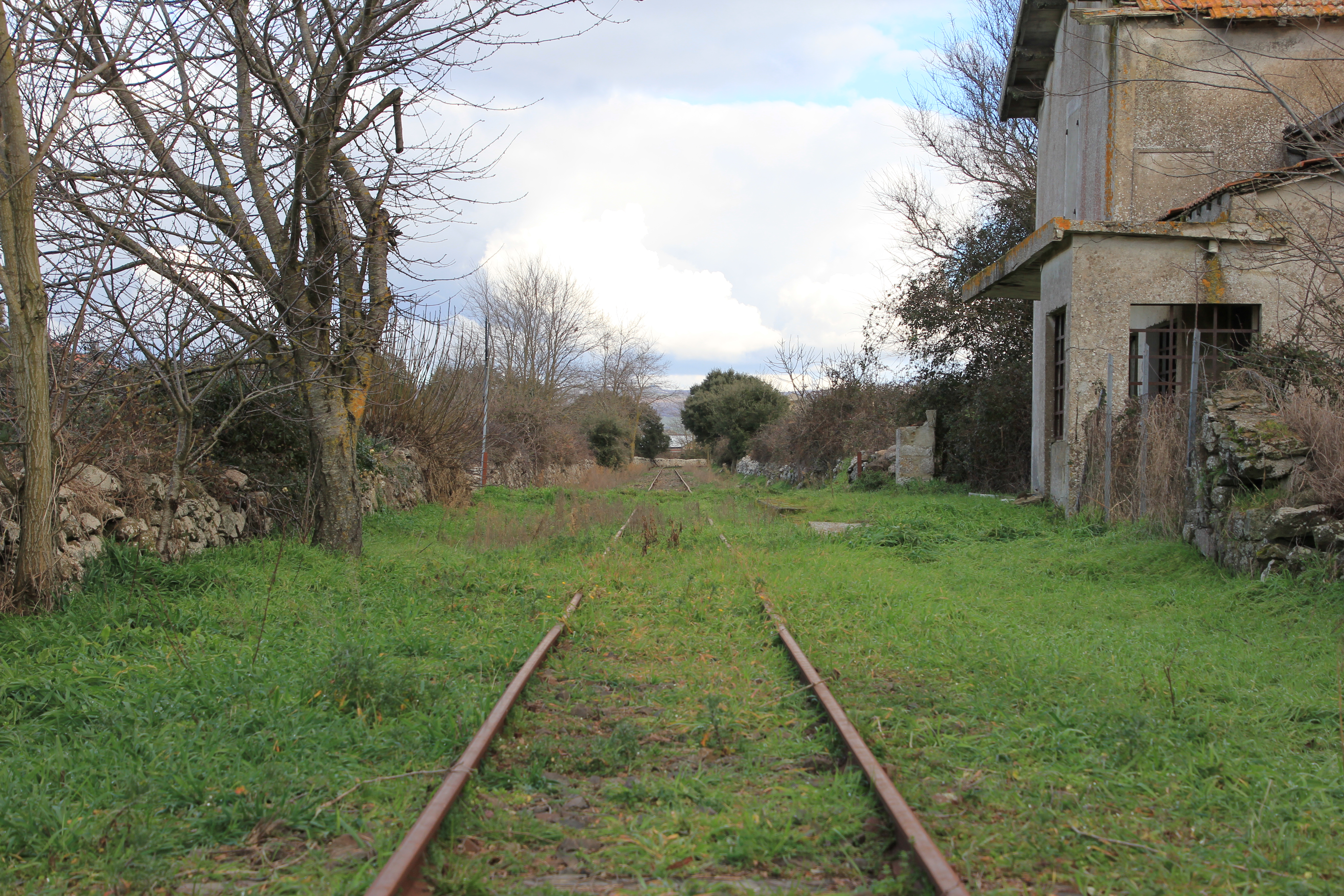 Macomer, stazione ferroviaria di Bara